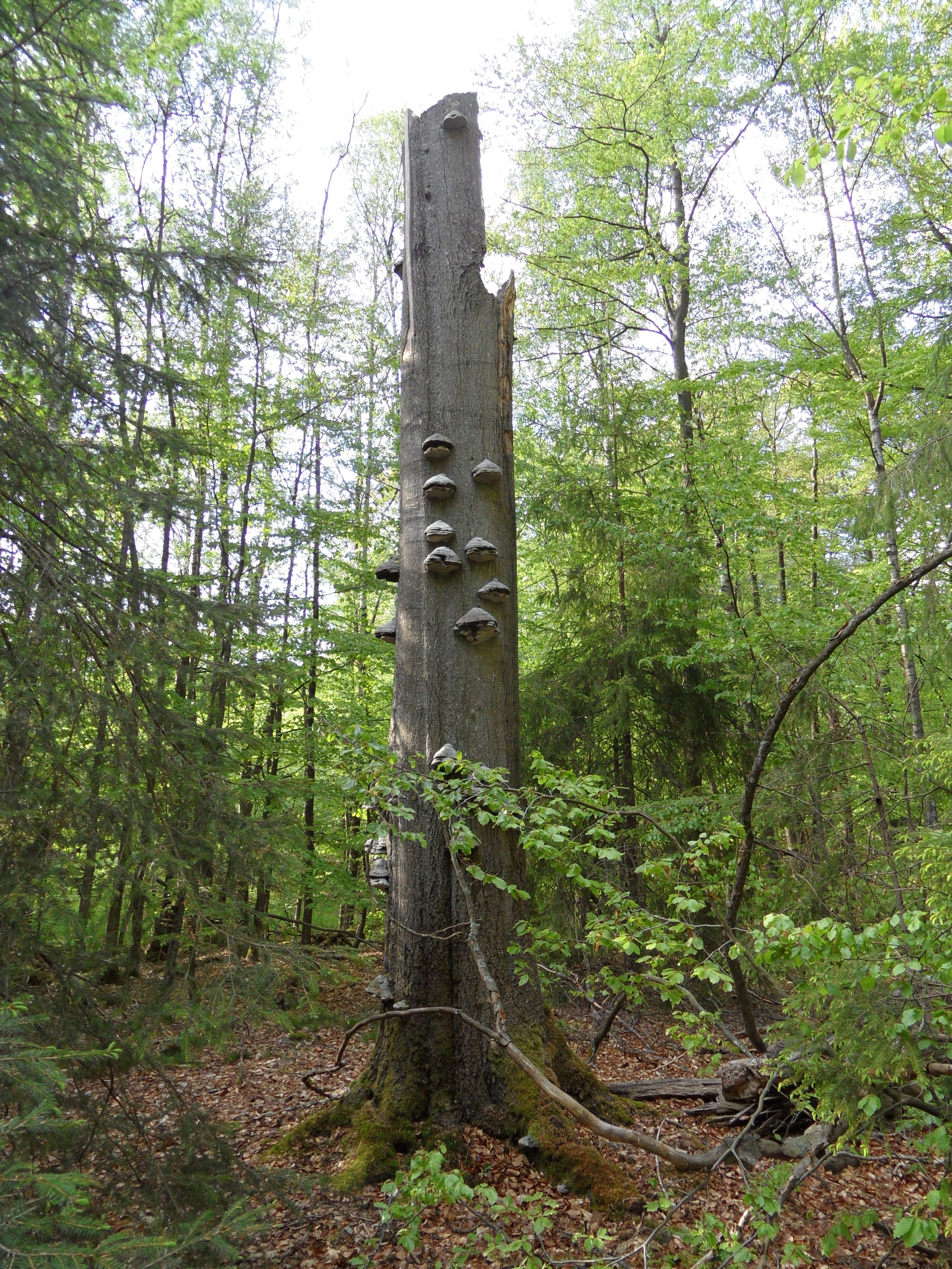 Högstubbe sommar